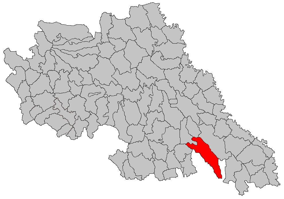 Categorie:Hărţi ale judeţului Iaşi